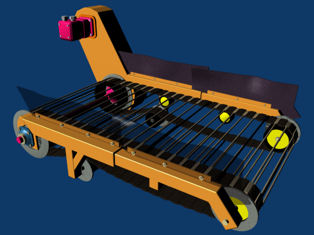 Siebband zwischen den Vorderrädern eines Rübenroders, Beispielzeichnung